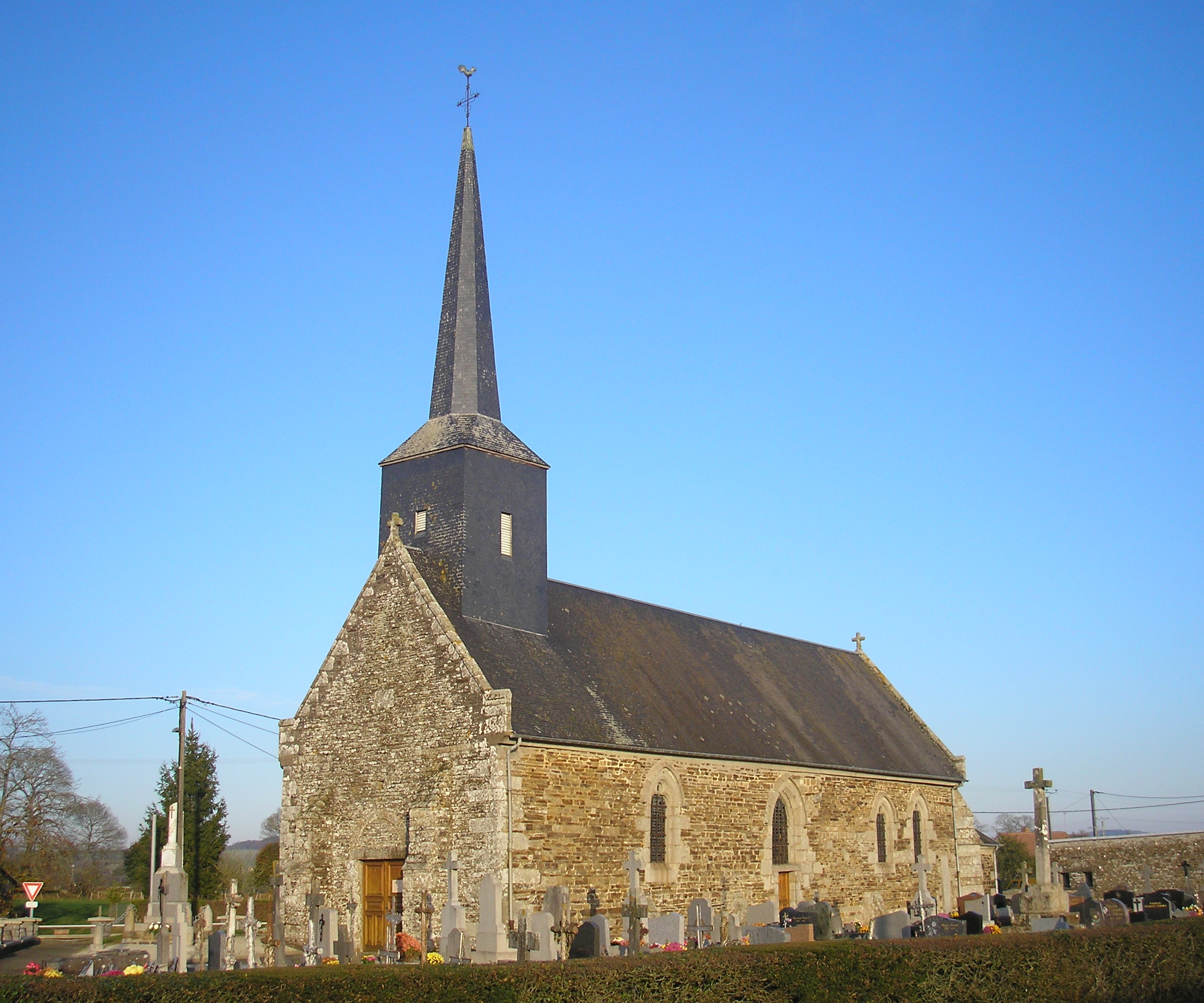 Fontenay (Normandie, France). L'église Saint-Pierre.